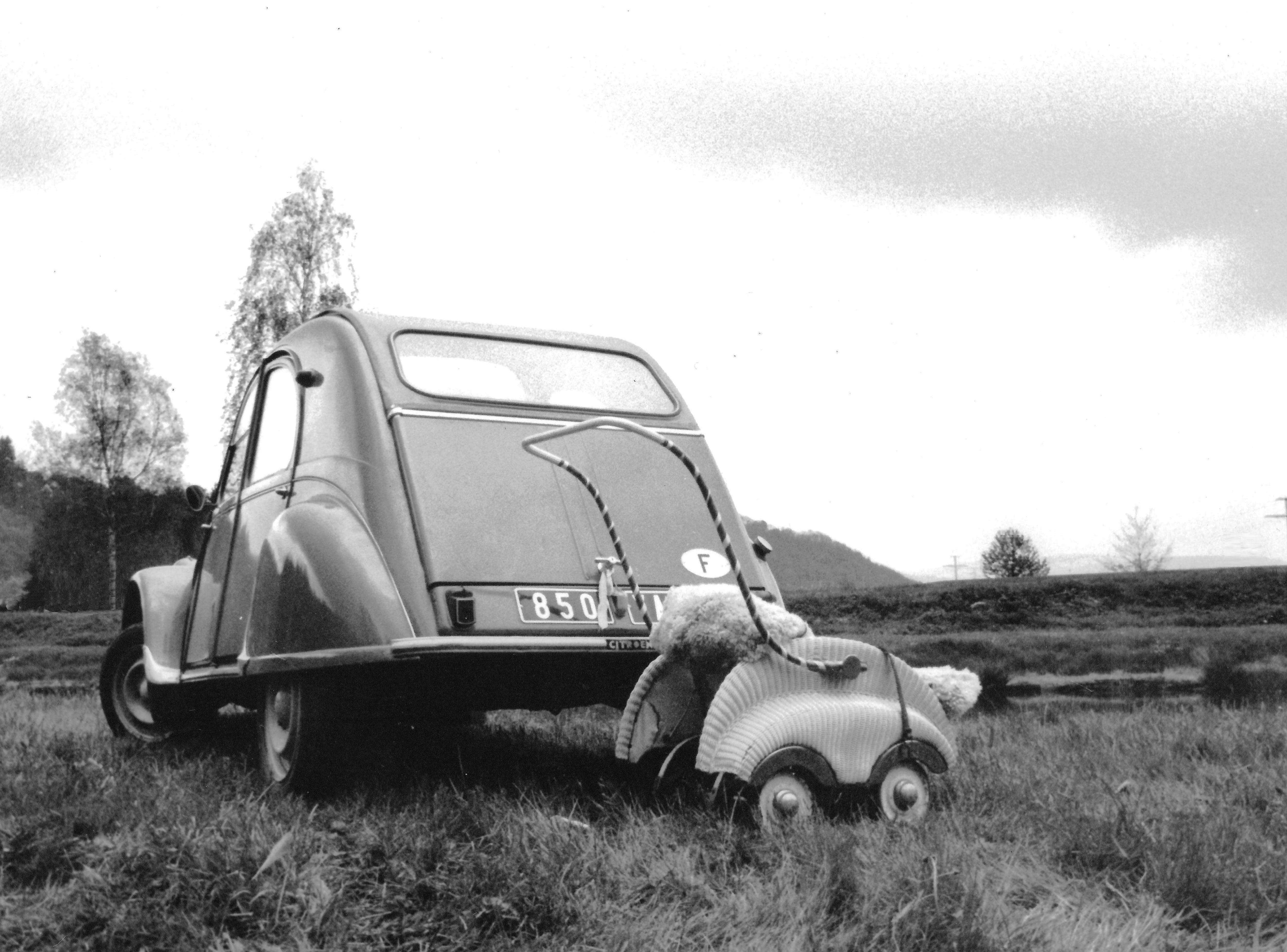 cliché argentique personnel